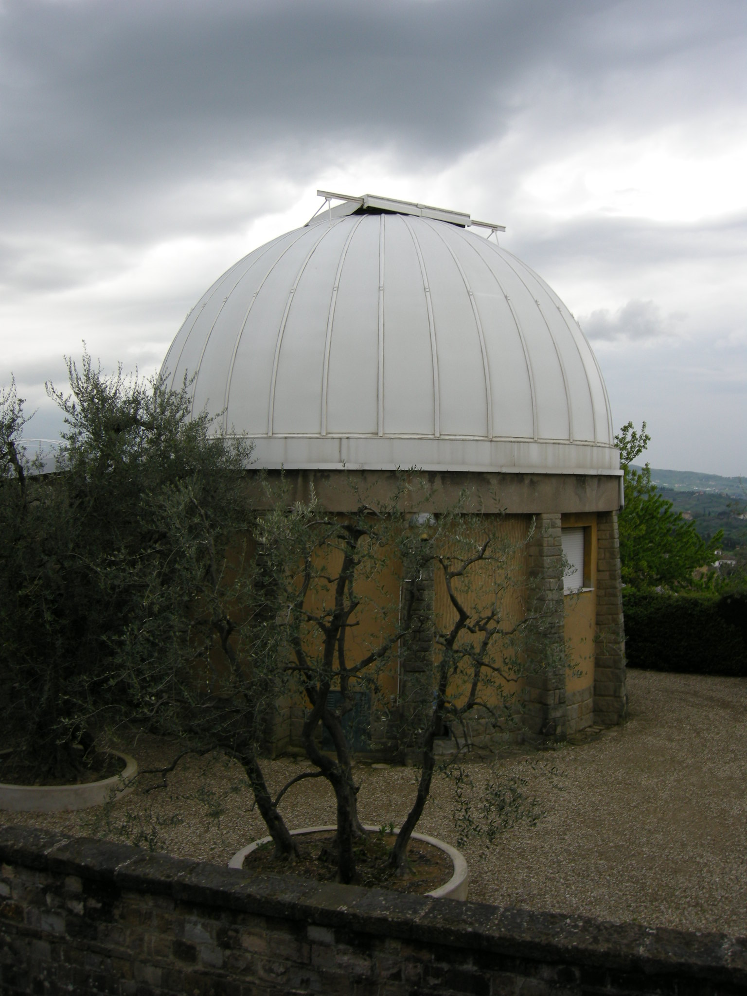 Osservatorio di arcetri, planetario